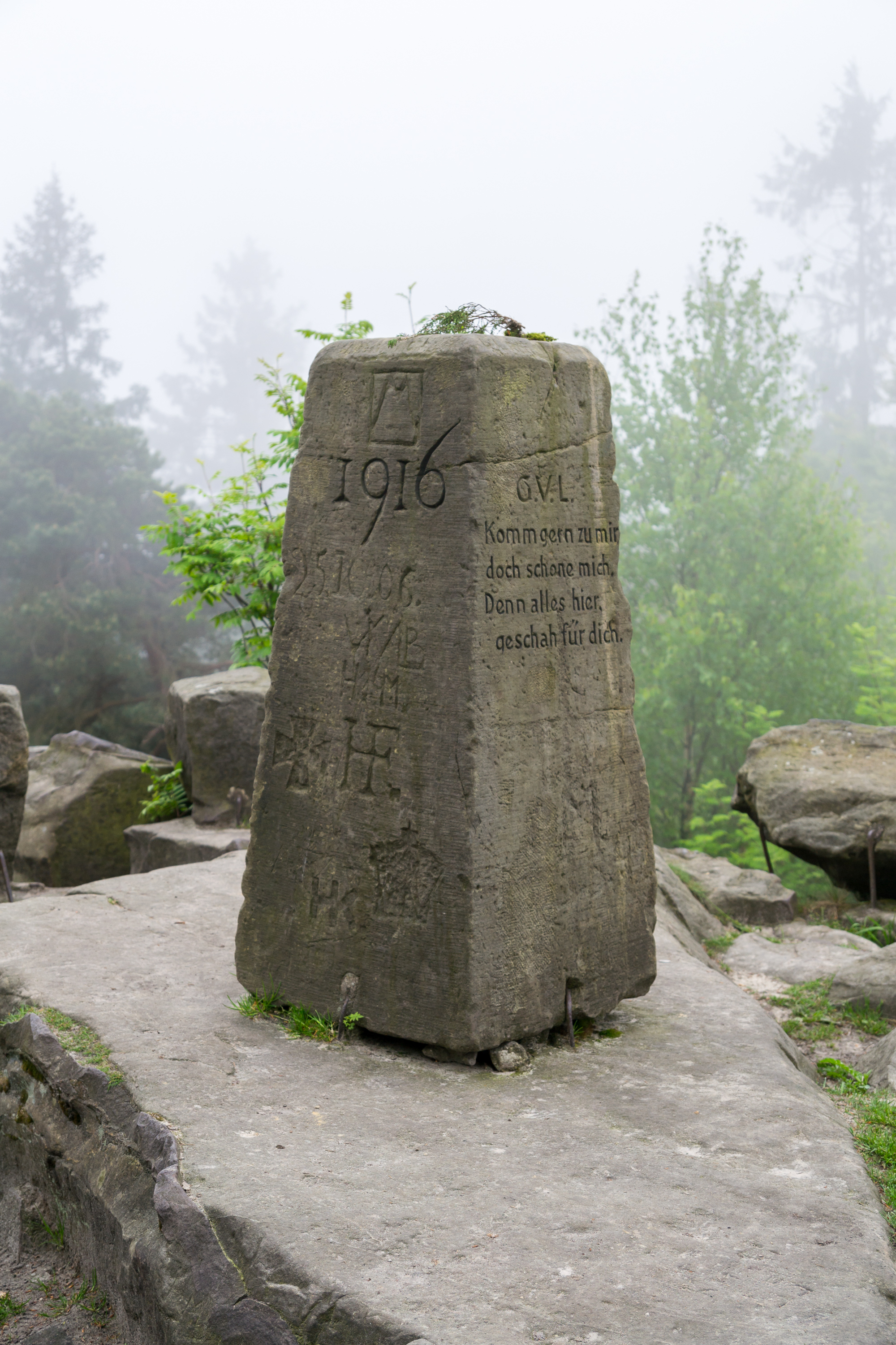 This is a photograph of an architectural monument. .2 Trigonometrischer Punkt auf der Lippischen Velmerstot